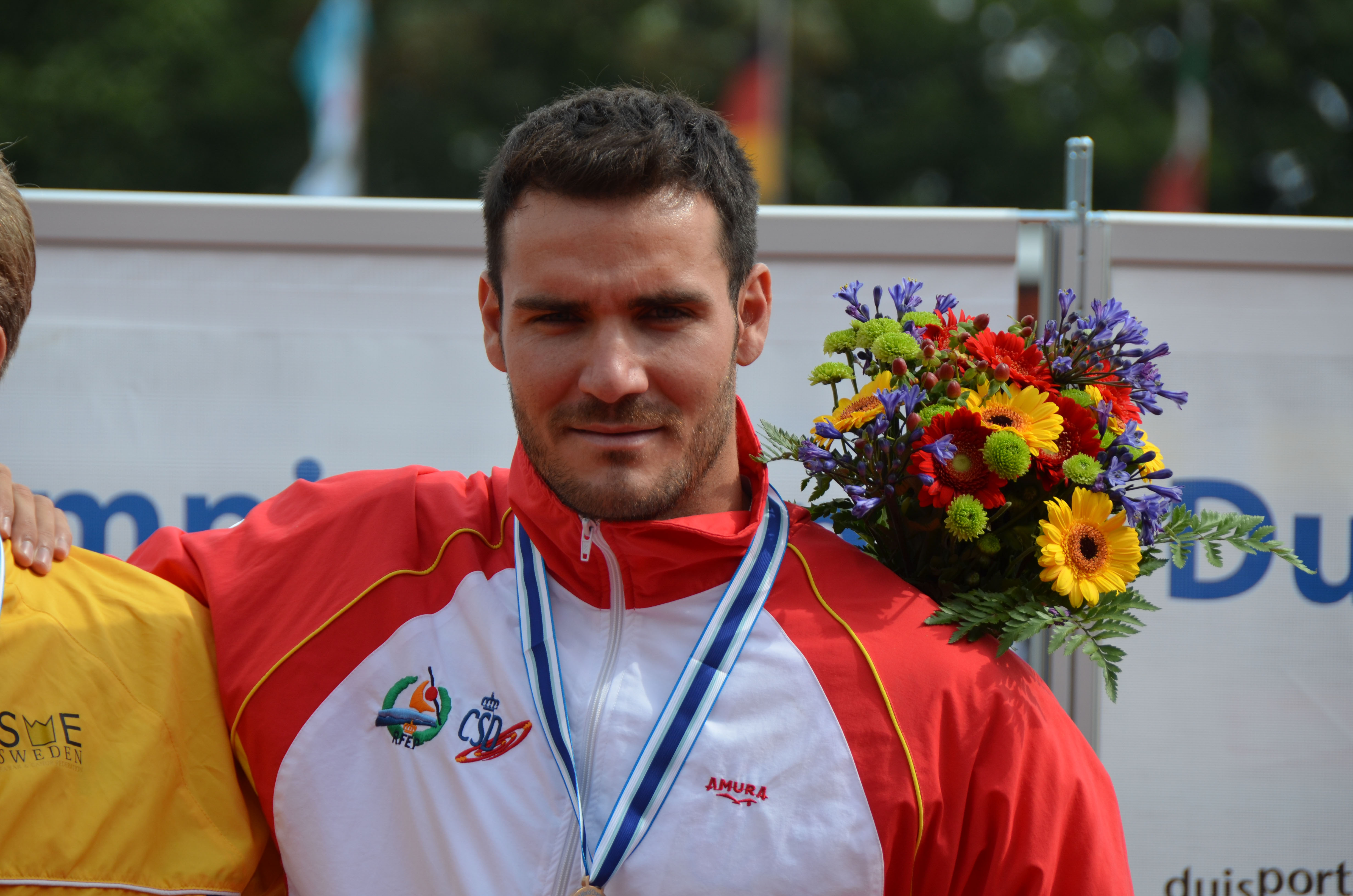 2013 ICF Canoe Sprint World Championships in Duisburg - Alle Ergebnisse/Teilnehmer unter: Gewinner:SWE - SWEDEN ÖSTRÖM, Petter CAN - CANADA DE JONGE, Mark ESP - SPAIN CRAVIOTTO RIVERO, Saúl